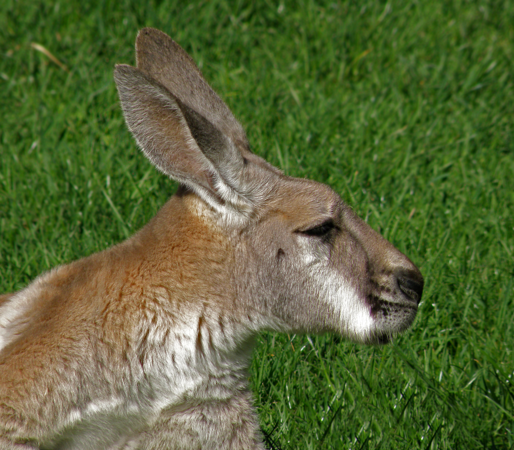 Warszawski Ogród Zoologiczny - Kangur rudy (Macropus rufus)